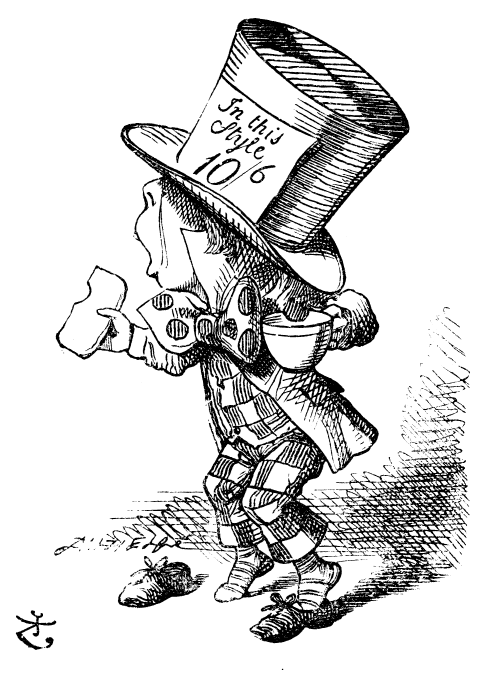 Illustration d'origine (1865), par John Tenniel (28 février 1820 – 25 février 1914), du roman de Lewis Carroll, Alice au pays des merveilles.